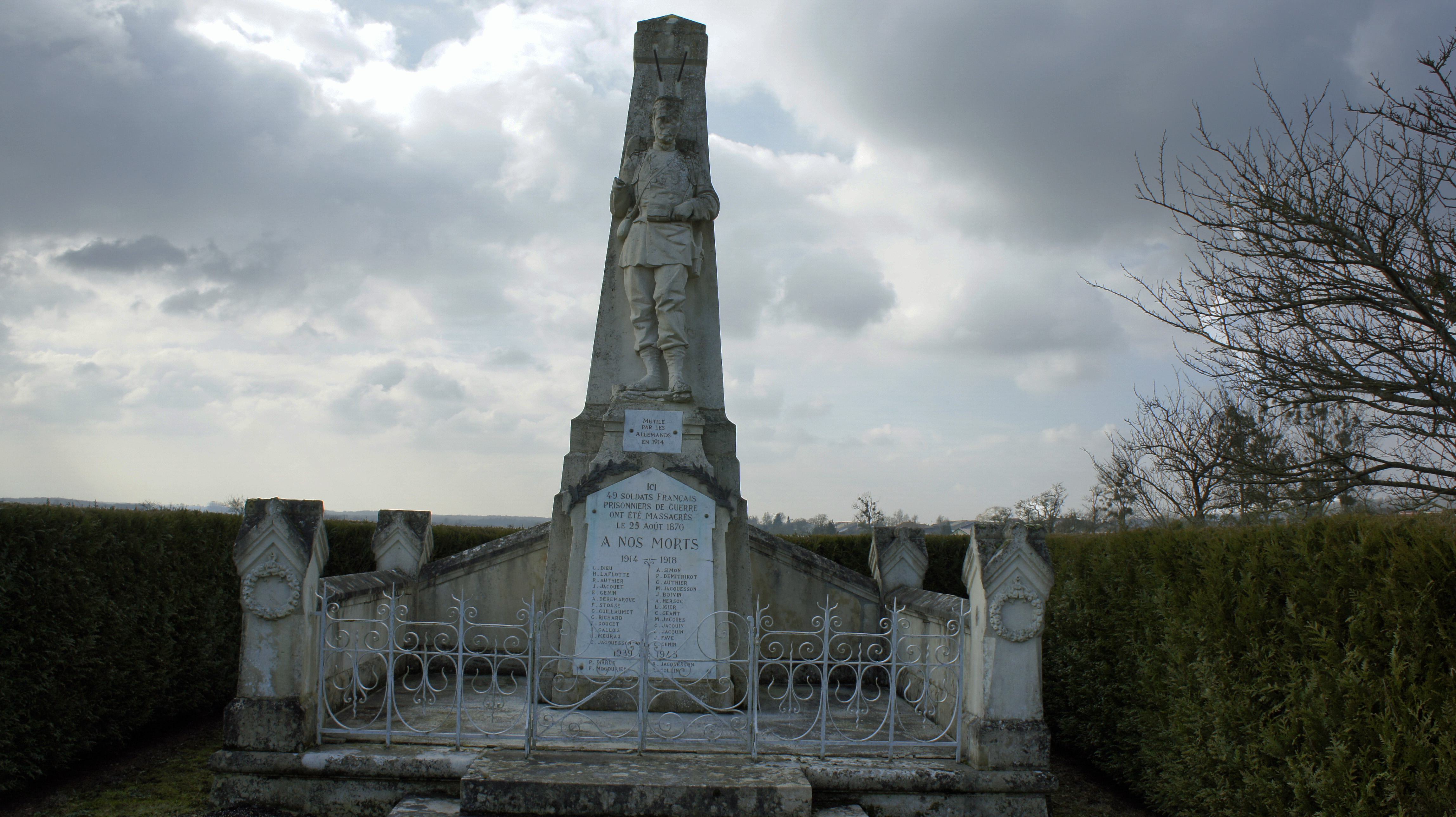 monument de Passavant en Argonne en mémoire du massacre des Mobiles du 25 août 1870.